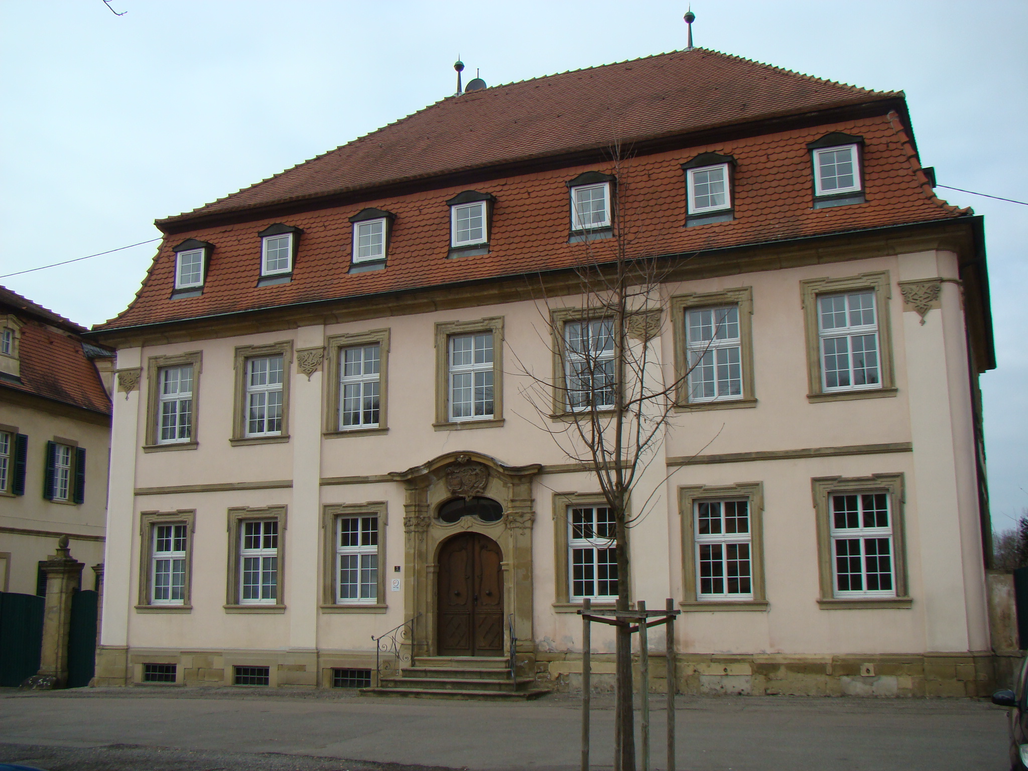 Gebäude des ehem. Stift Wimpfen, ehem. Dechanei, Lindenplatz 5